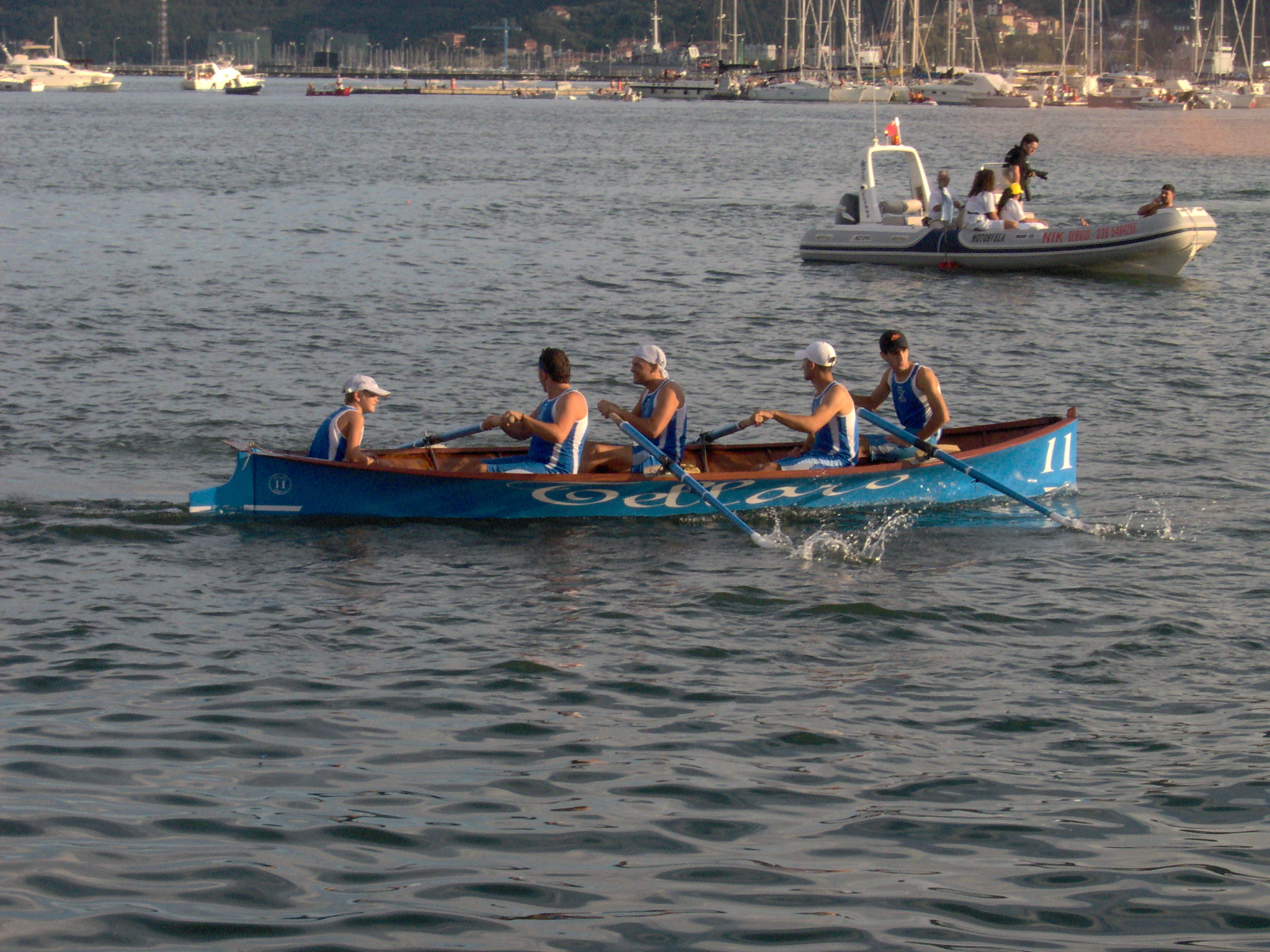 La borgata di Tellaro durante l'81° Palio del Golfo